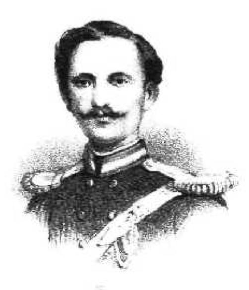 Griechischer Gelehrter, 19. Jahrhundert